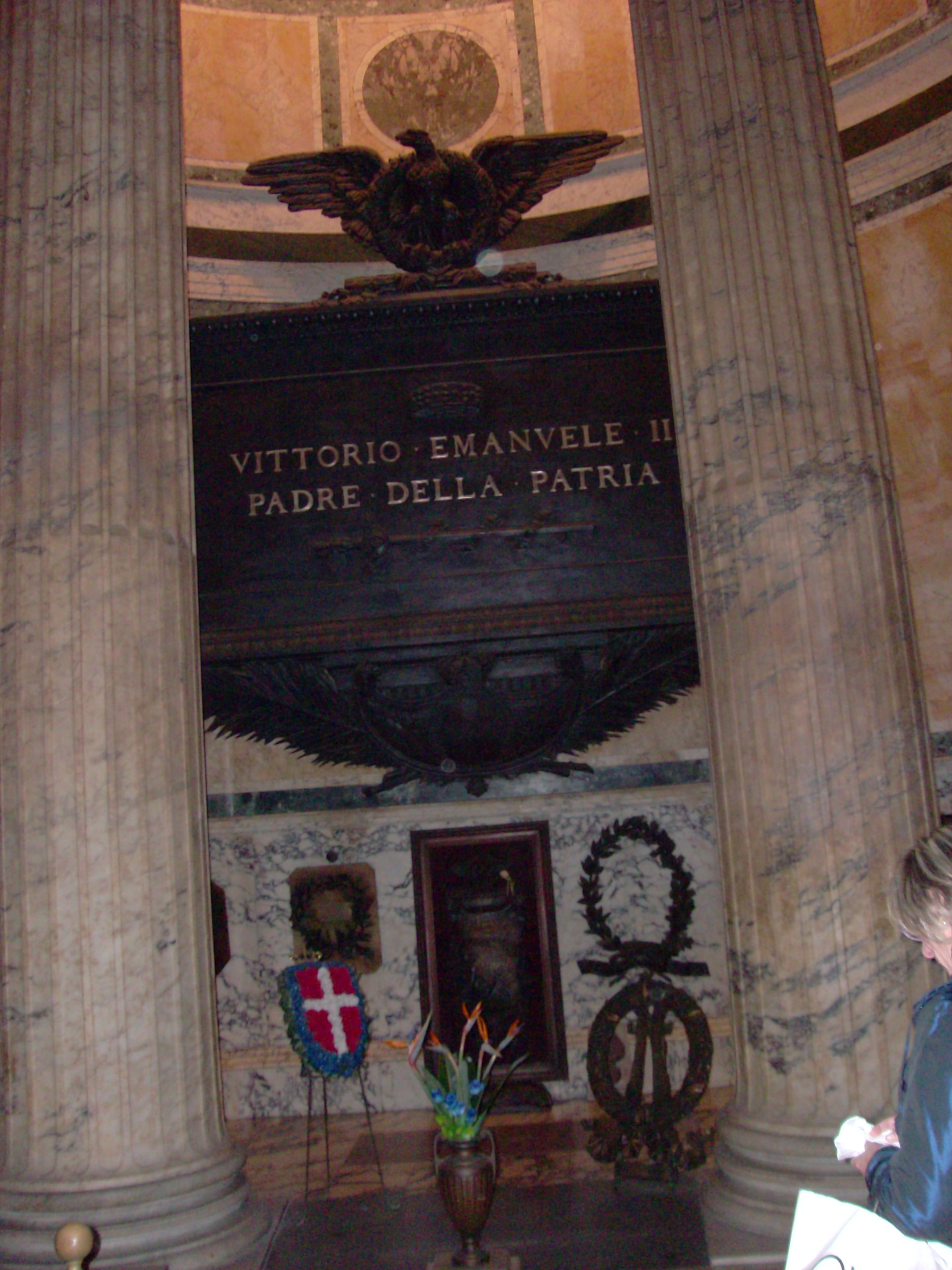 Tomba di Vittorio Emanuele II di Savoia nel Pantheon a Roma